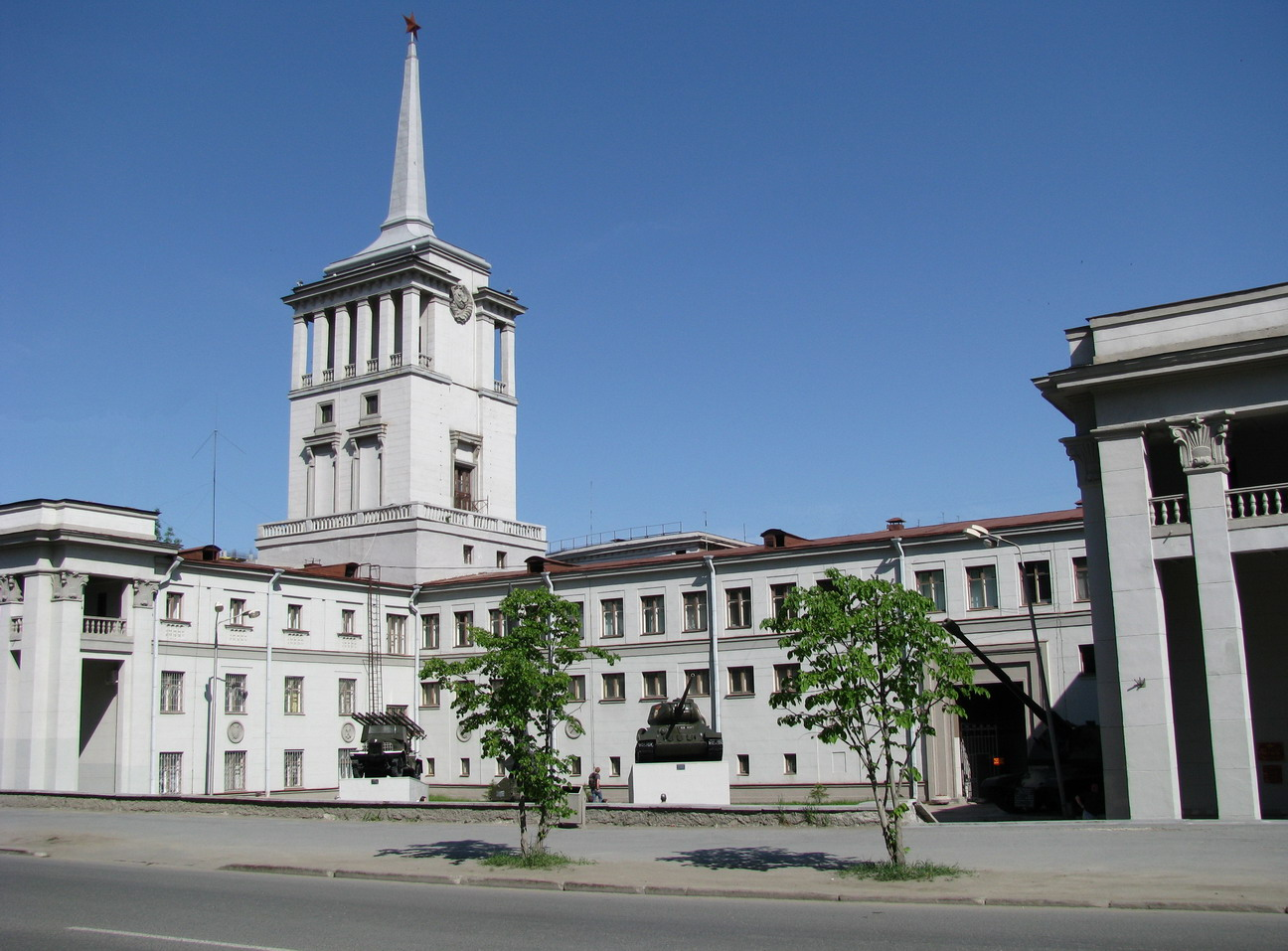 Музей Приволжско-Уральского военного округа в здании Окружного Дома офицеров в Екатеринбурге